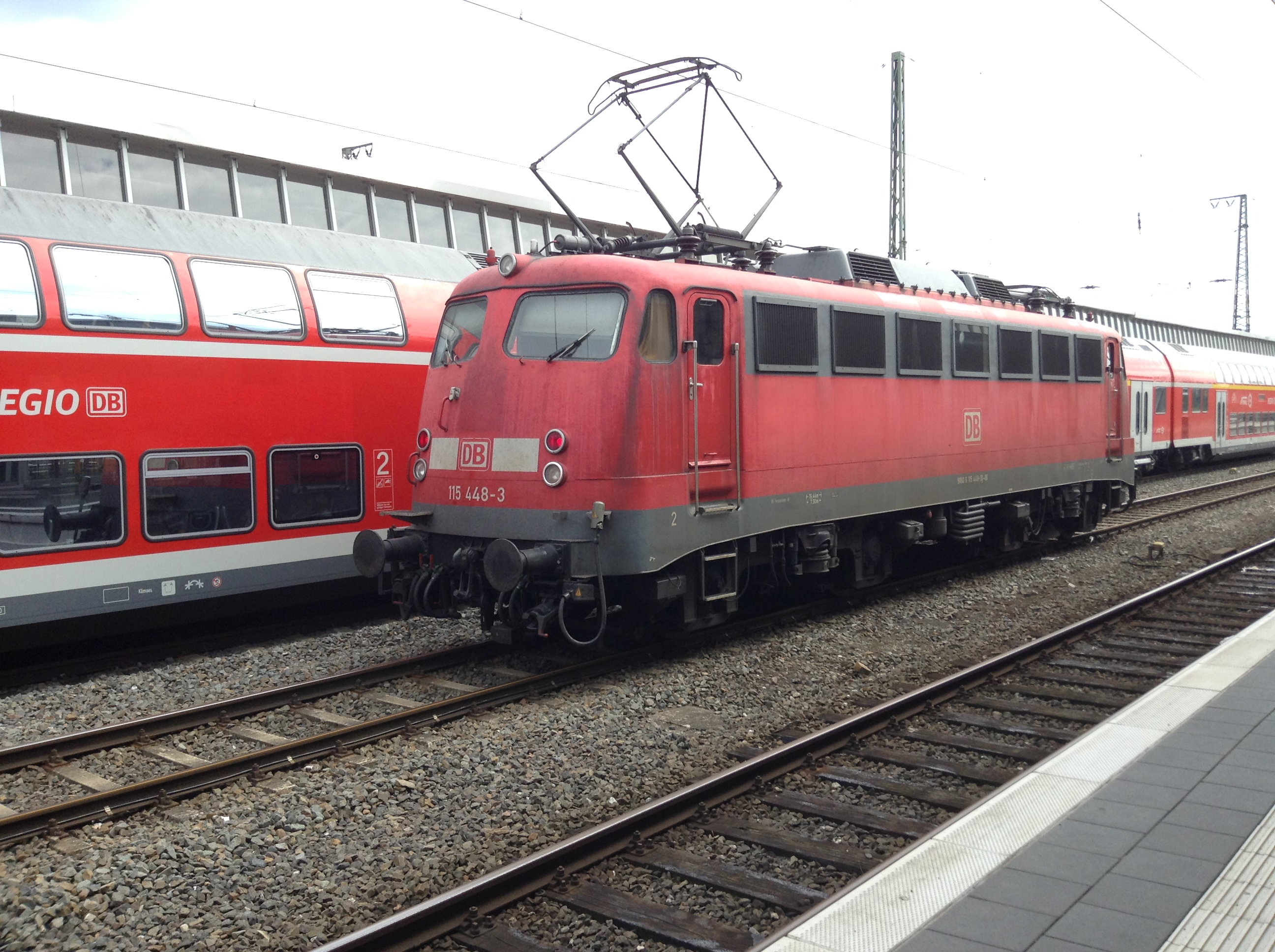 DB-Baureihe 115 448-3 am 15. August 2015 in Münster (Westfalen) Hauptbahnhof